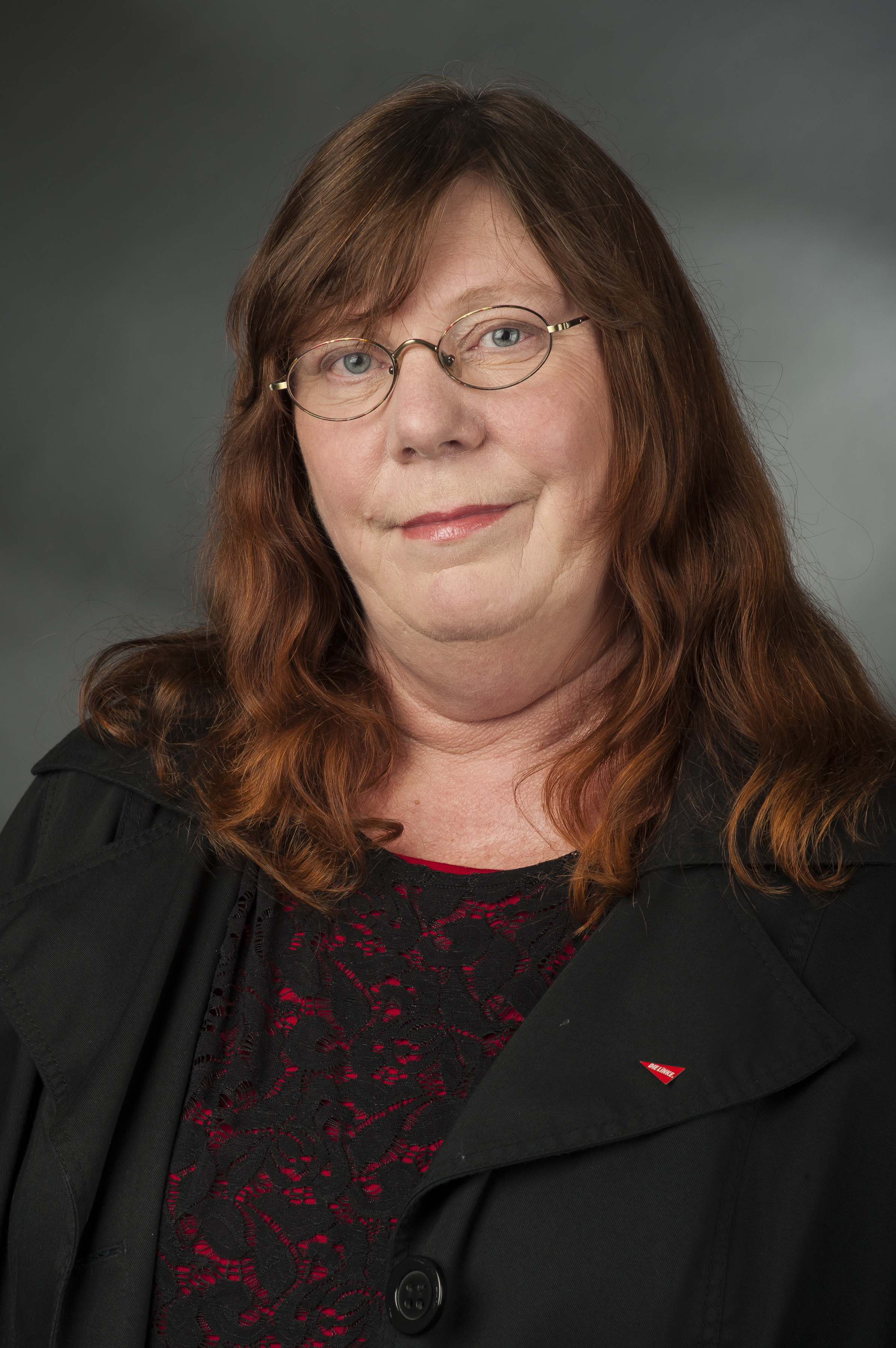 Pia Zimmermann (* 17. September 1956 in Braunschweig) ist eine deutsche Politikerin (Die Linke). Sie war 2008 bis 2013 Abgeordnete des Niedersächsischen Landtags und gehört seit 2013 dem Deutschen Bundestag an.